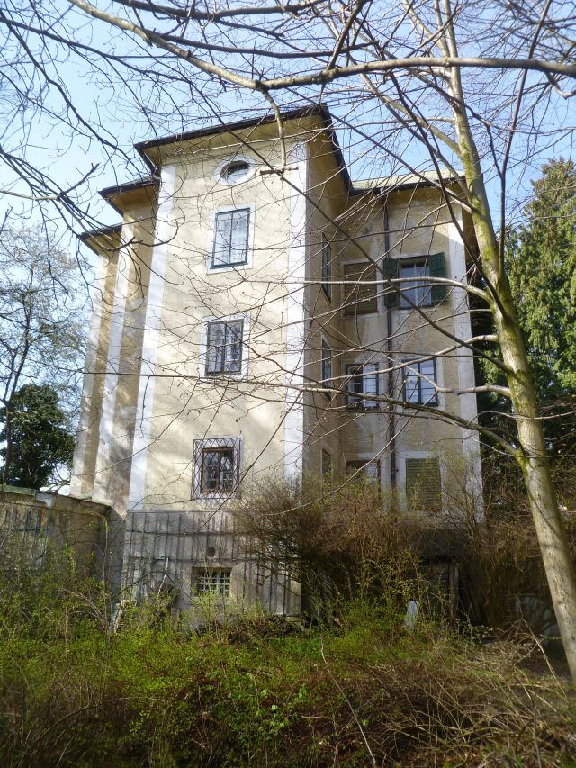 Nonntaler_Hauptstraße_51-53-Rückseite